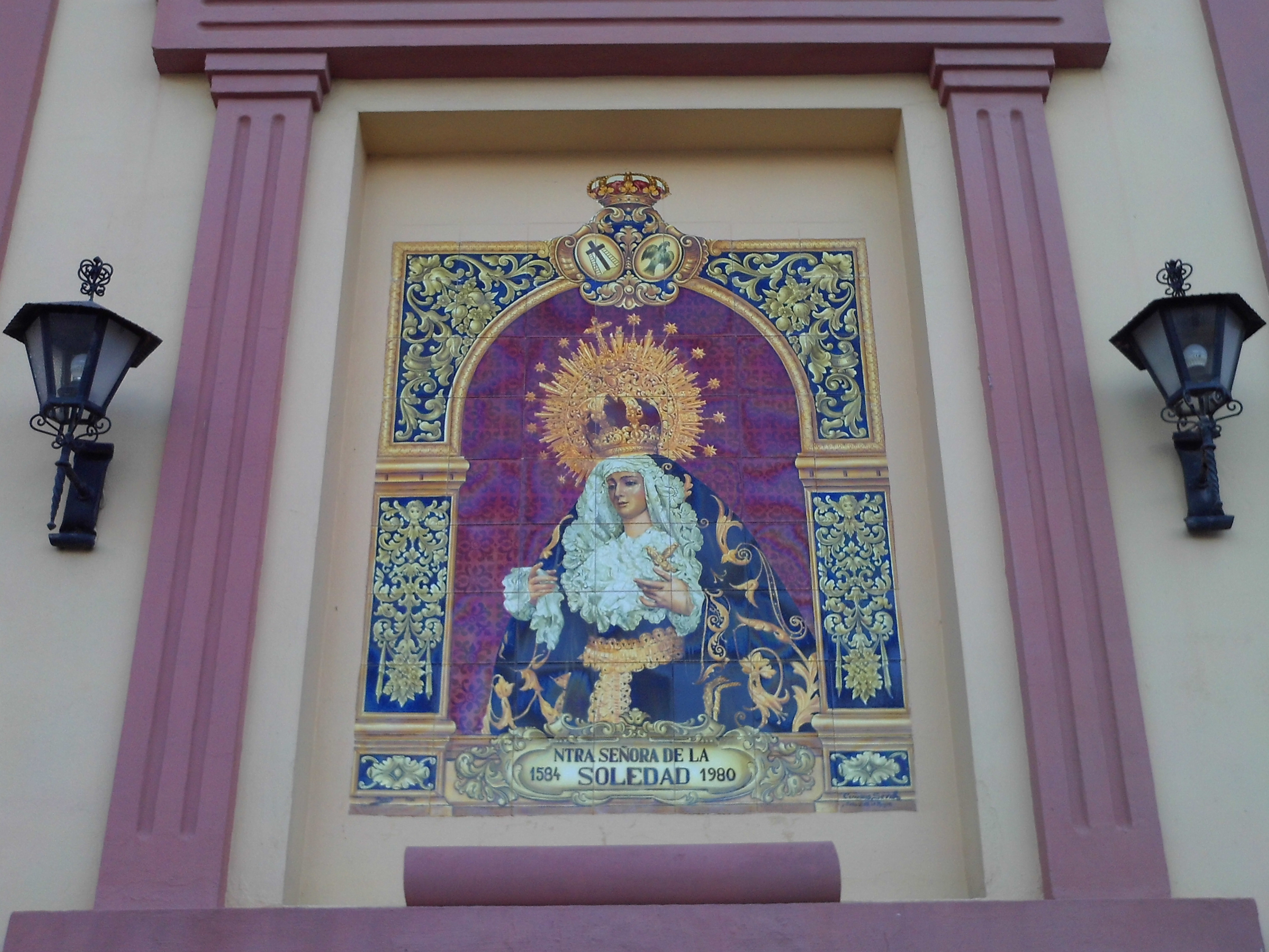 Azulejo de al Virgen de la Soledad en la fachada de la capilla de la Hermandad de la Soledad, Benacazón, provincia de Sevilla, Andalucía, España.